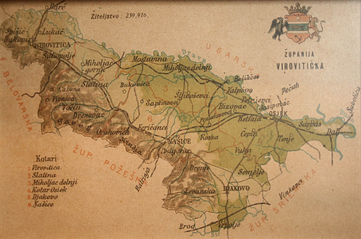 Zemljovidi županija na razglednicama oko 1900. godine, snimljeno tijekom Noći muzeja